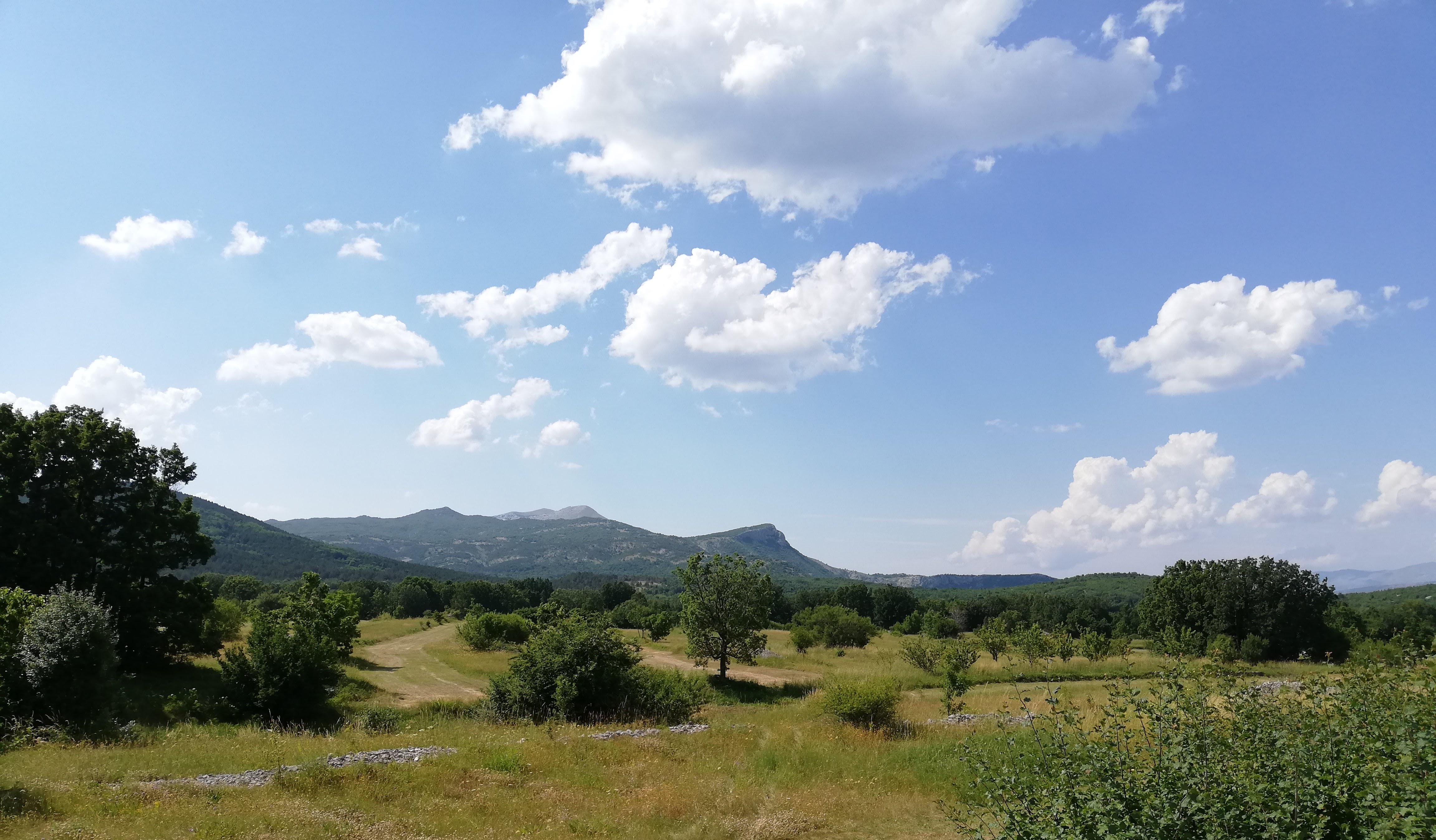 Blick auf das Zelovo Feld